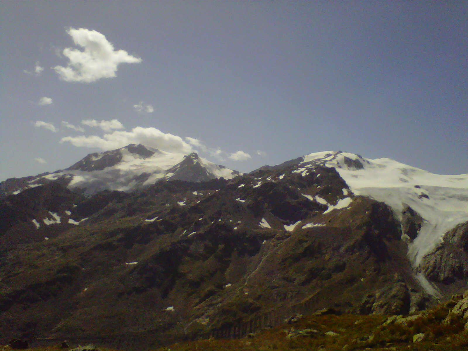 La Val de la Mare con la fantastica vista su Palon de la Mare, Monte Vioz e Cevedale